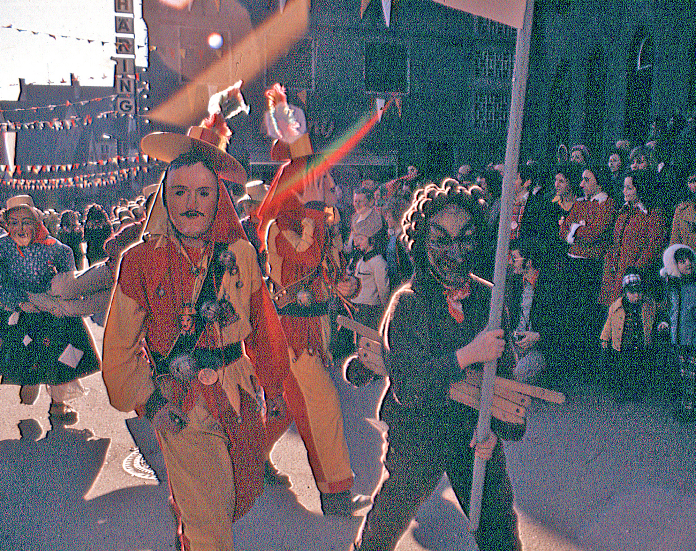 Großes Narrentreffen 1974 in Riedlingen/Donau links: Spättlemadlee der Freien Narrenzunft Hausach e. V. Mitte: zwei Hansele der Freien Narrenzunft Hausach e. V. rechts als Schildträger: Boppele der Narrenzunft Gole 1865 e. V. Riedlingen